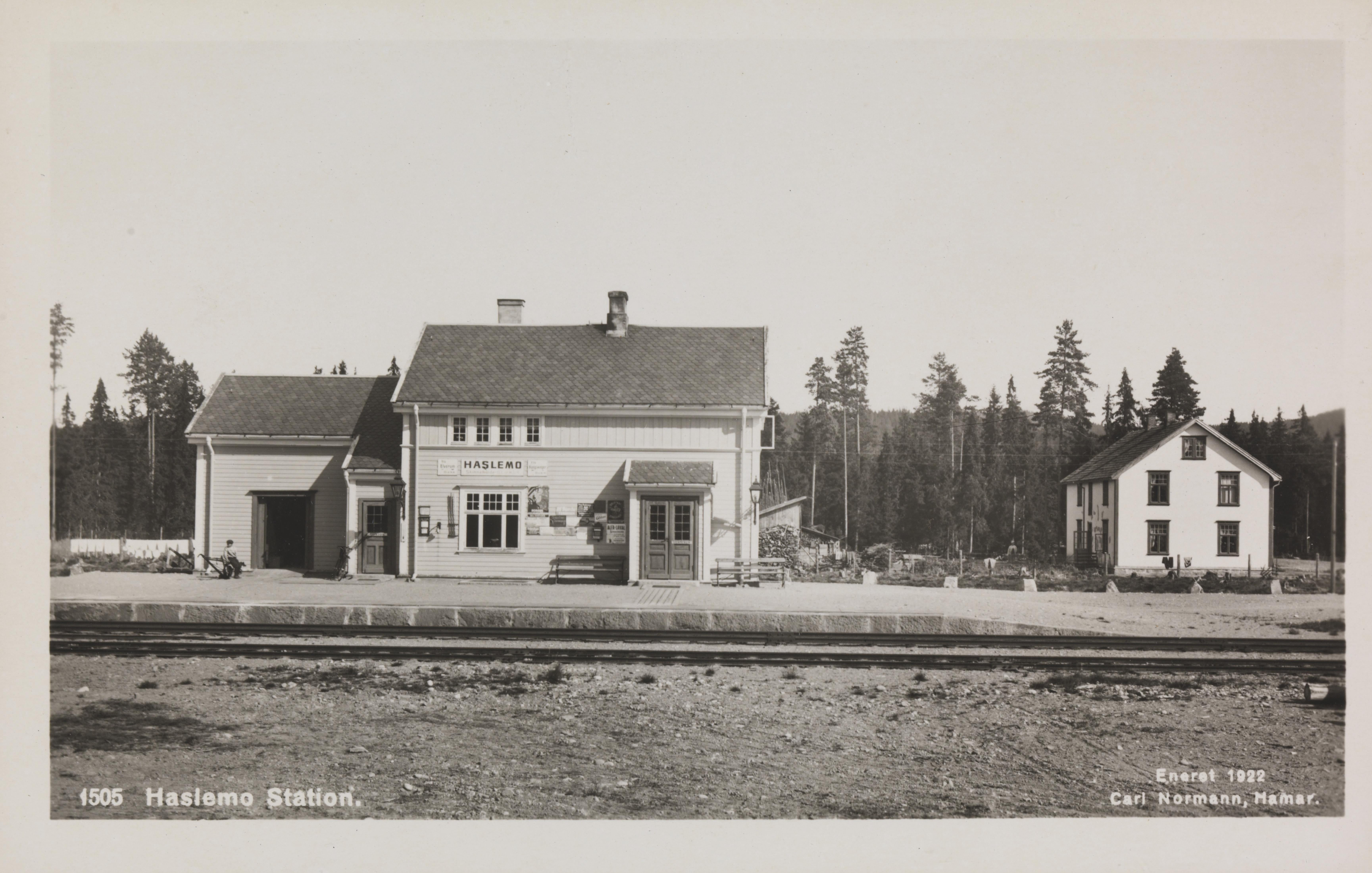 Bildet er hentet fra Nasjonalbibliotekets bildesamling Haslemo,Haslemo stasjon, Åsnes, Hedmark